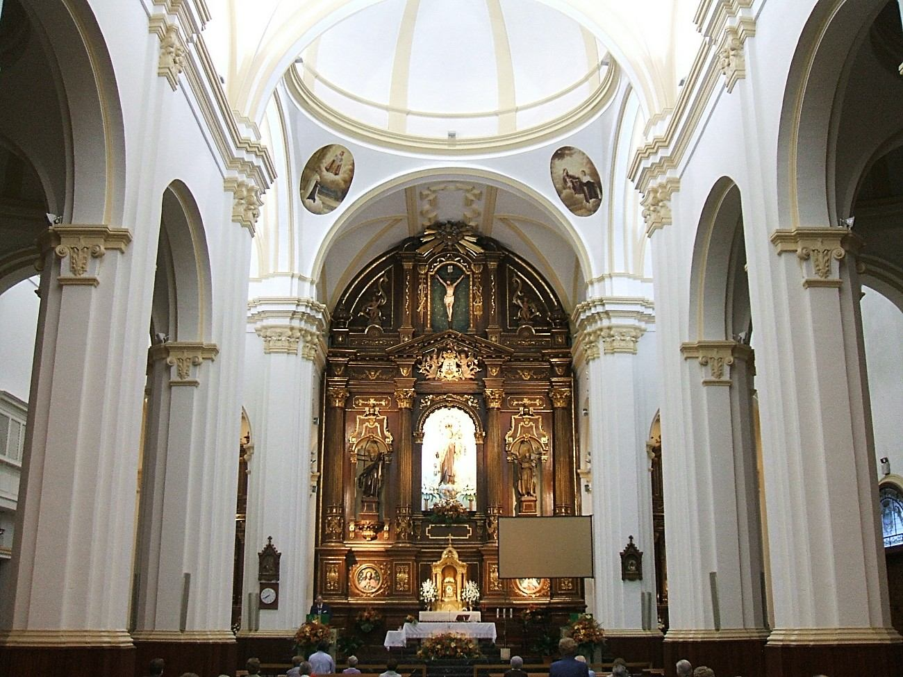 Iglesia del Carmen (PP Carmelitas Descalzos), en Vitoria-Gasteiz, País Vasco, España